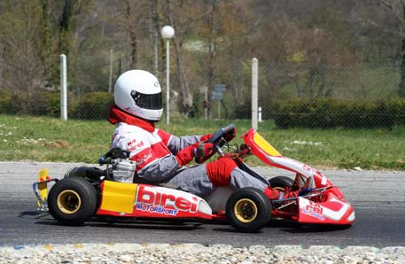 Stéphane Agnus - Birel - X30